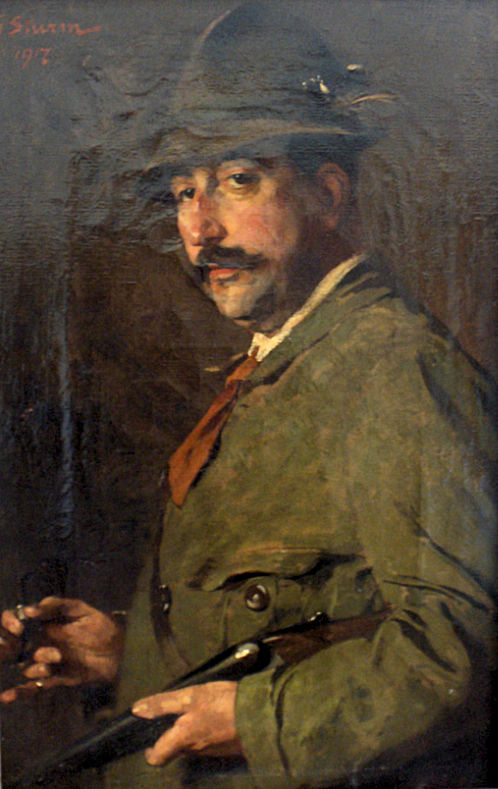 portret August Falise